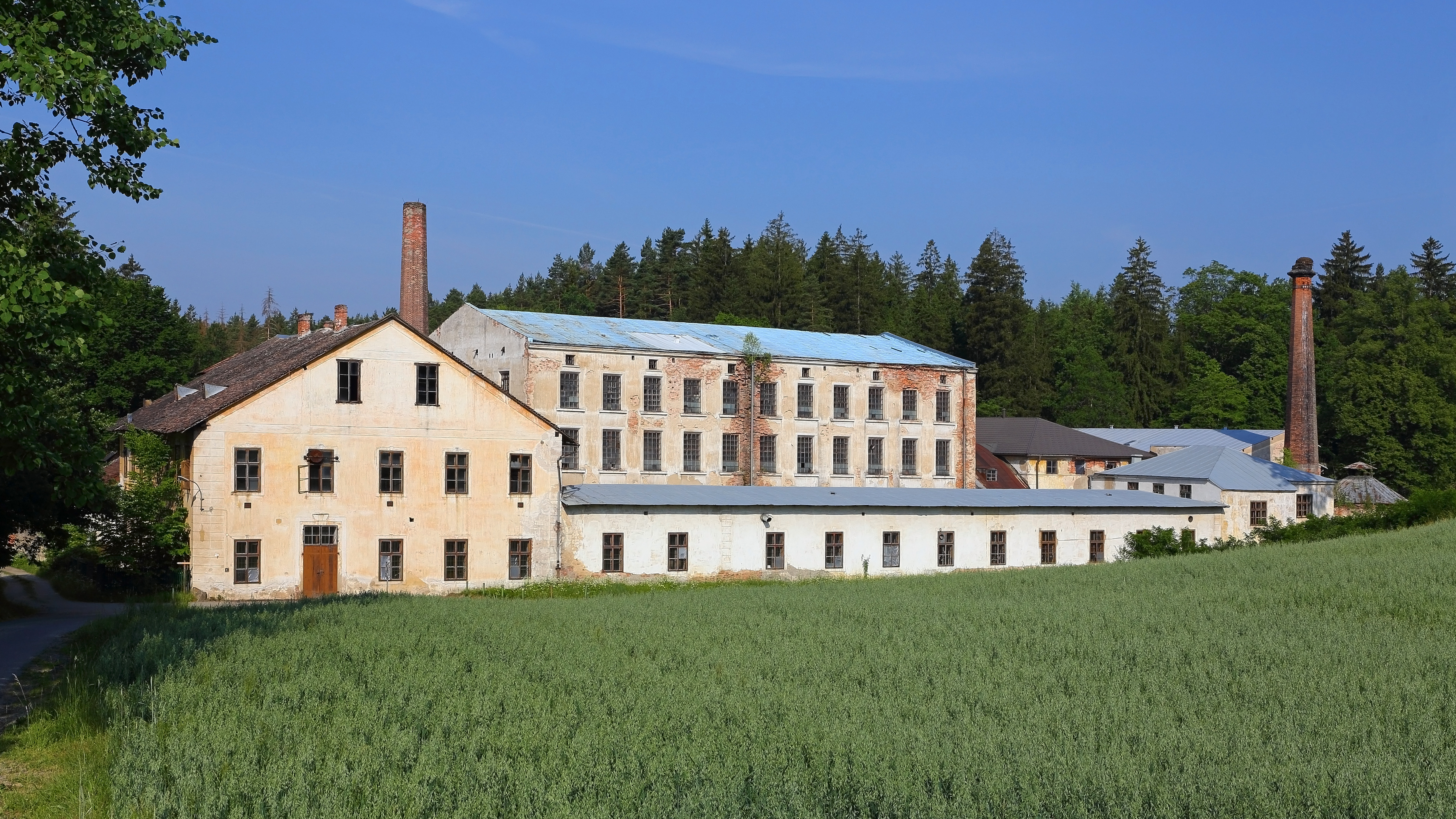 Ostseite der Anderlfabrik